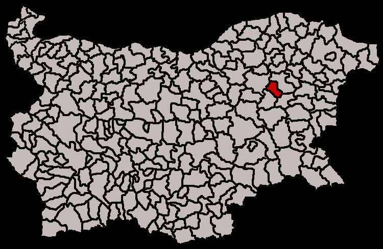 Община Велики Преслав на картата на България